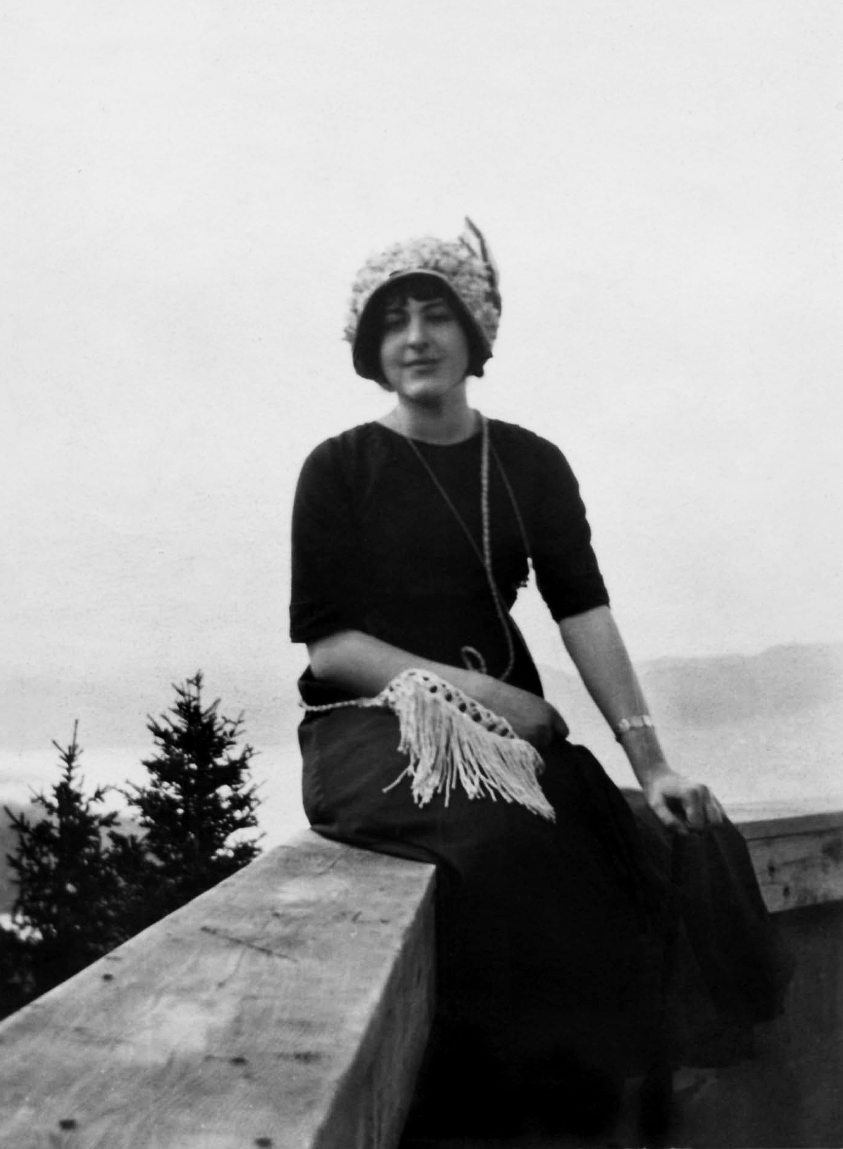 Julie Helene «Leny» Bider (1894-1919) - Aufnahme 1916 auf einem unbekannten Aussichtspunkt